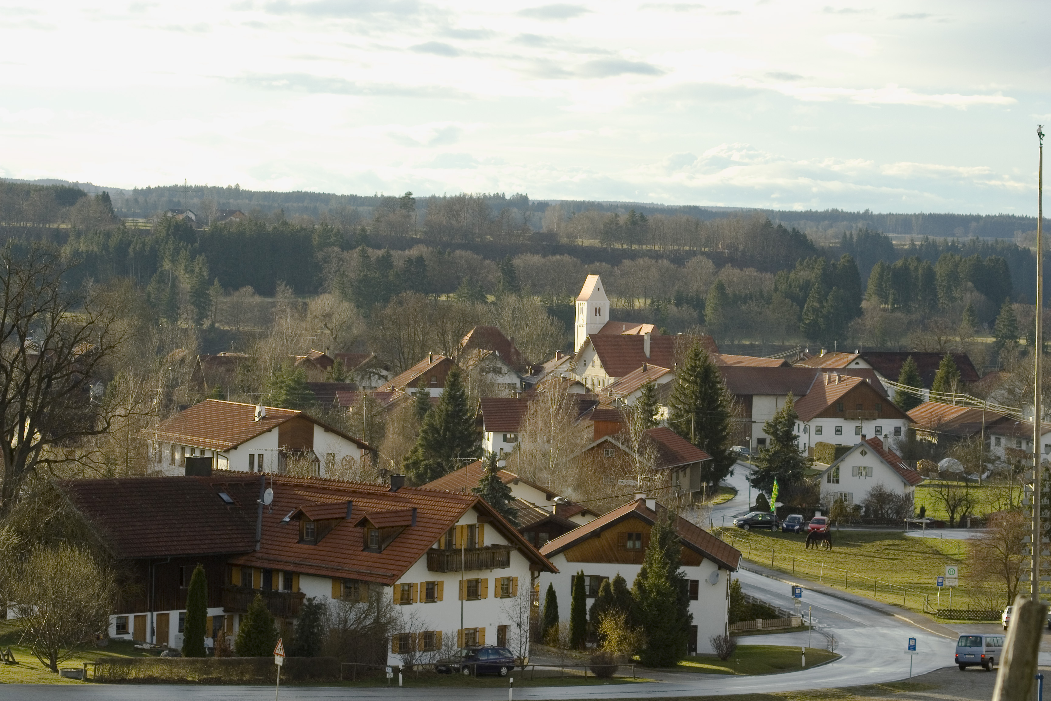 Apfeldorf, Bavaria, Germany, Public Domain, Picture from Alexander Heger in March 2008